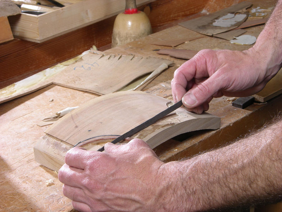 Historische Intarsientechnik